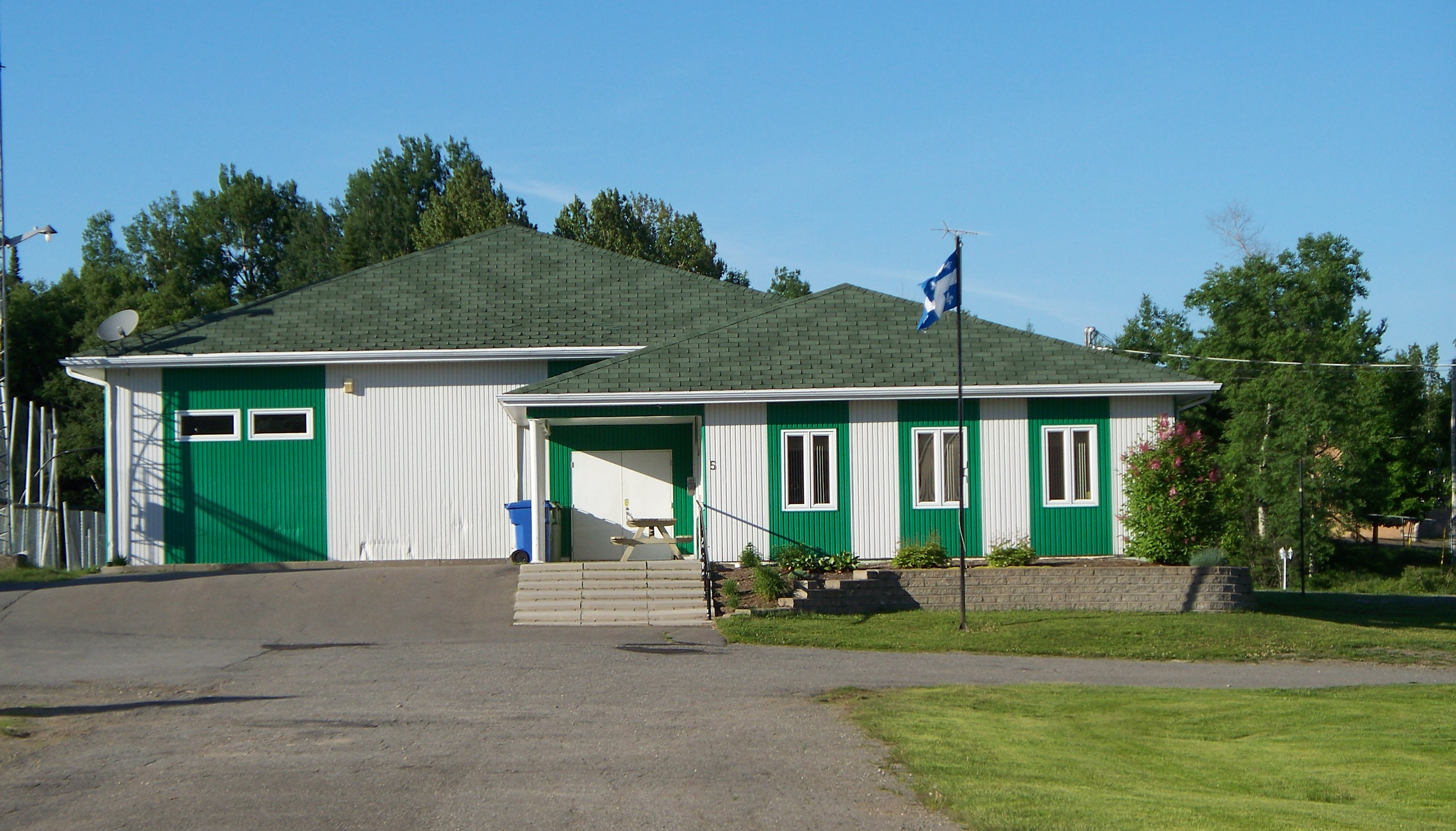 Ancienne chapelle rénovée en 1995